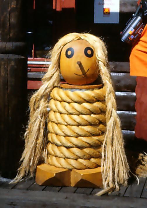 Spiralen-mascot, der illuderer Spiralens løb op gennem bjerget. 4. august 1999.